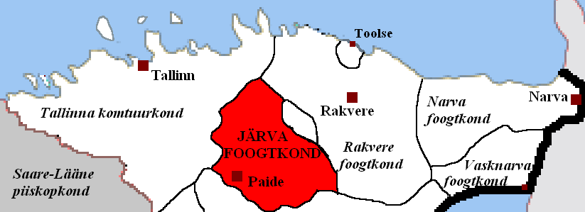 Järva foogtkonna kaart